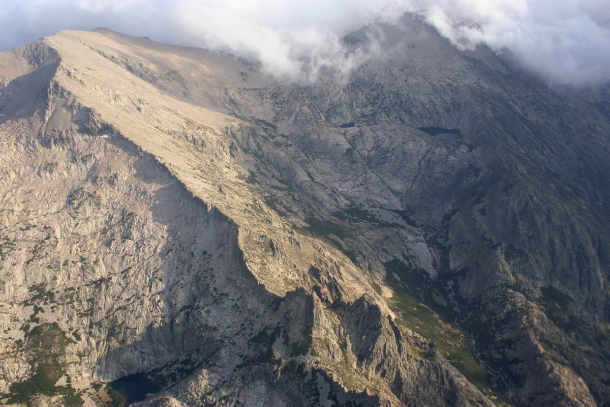 A gauche le lac de Cavaciolle ; au centre le vallon de Rinoso avec ses deux lacs surplombant le cirque des cascades (photo aérienne)